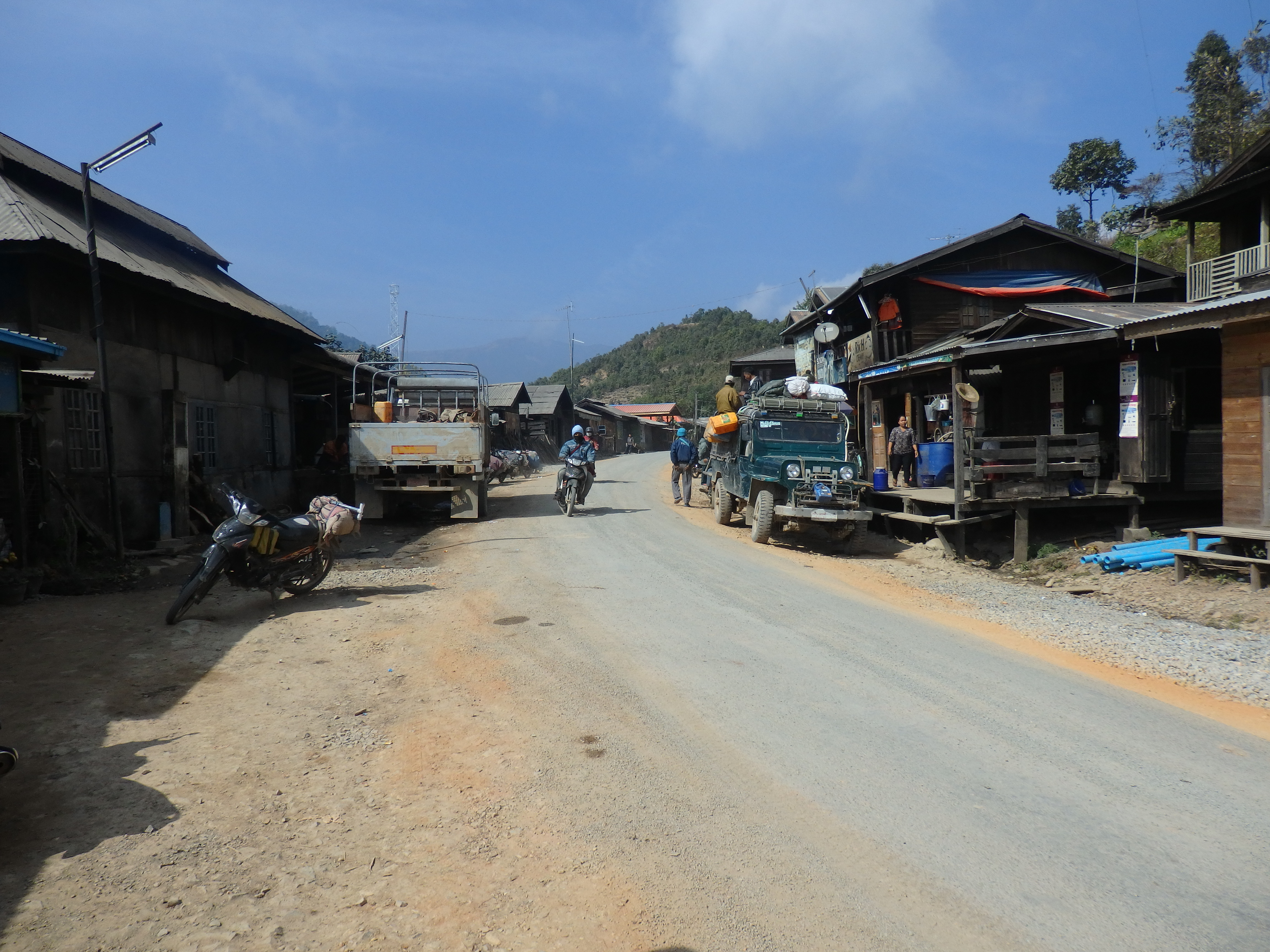 Falam, Myanmar (Burma)